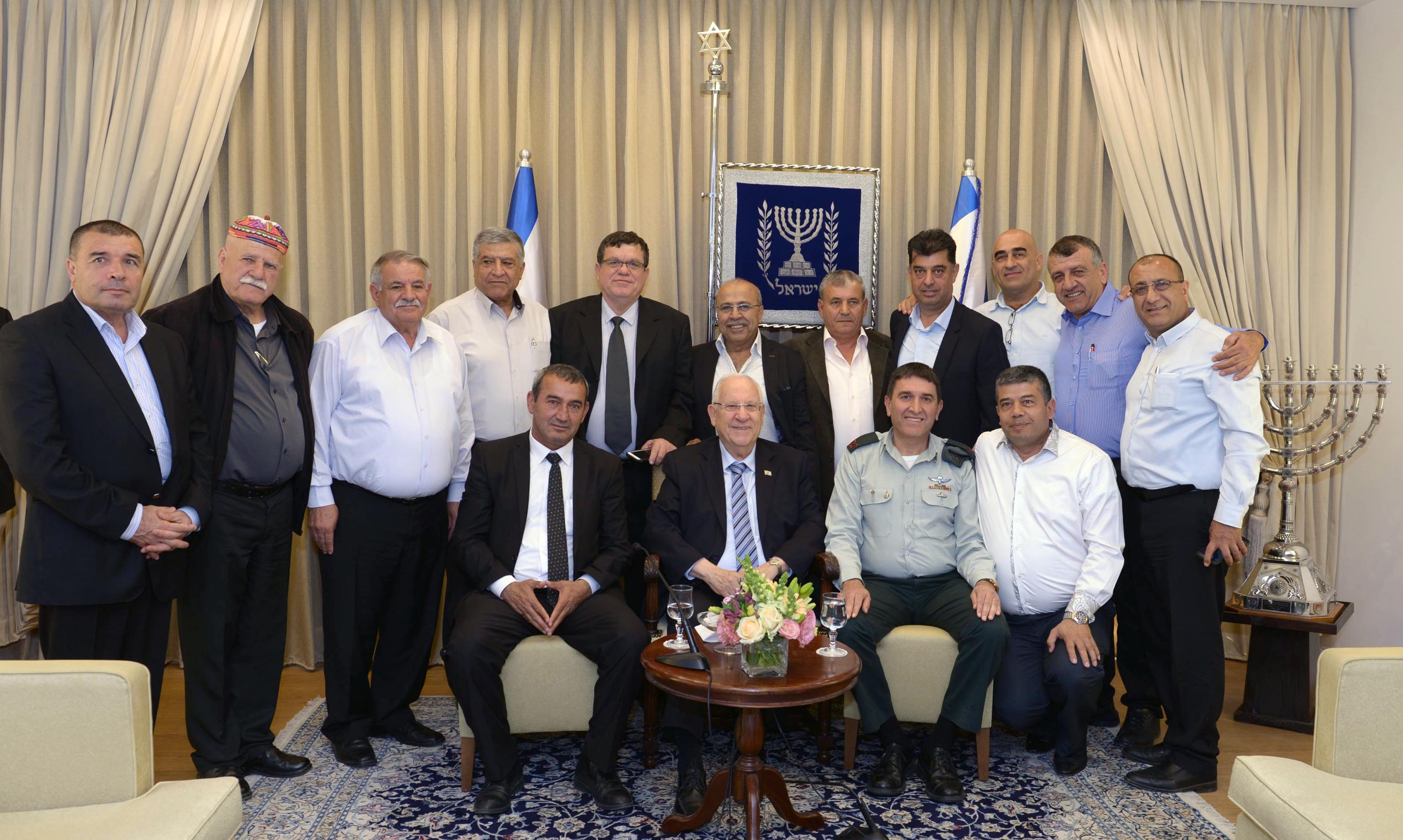 נשיא מדינת ישראל ראובן ריבלין נפגש עם ראשי הרשויות הדרוזיות בישראל. בפגישה השתתפו שורה עליונה מימין לשמאל: העומדים מימין לשמאל: מאג'ד עאמר (חורפיש), ביאן קבלאן (בית ג'ן), סלמאן עאמר (ג'וליס), סויד סויד (פקיעין), נביה אסעד (כסרא-סמיע), רפיק חלבי (דאלית אל-כרמל), זכריא נאבסו (כפר כמא), זיאד דגש (מע'אר), וג'יה כיוף (עספיא), ניהאד מושלב (אבו סנאן), מעד'א חסבאני (יאנוח-ג'ת) היושבים הם מימין לשמאל: שאוקי אבו לטיף (ראמה), חסון חסון, רובי ריבלין, והיב חביש (ירכא)